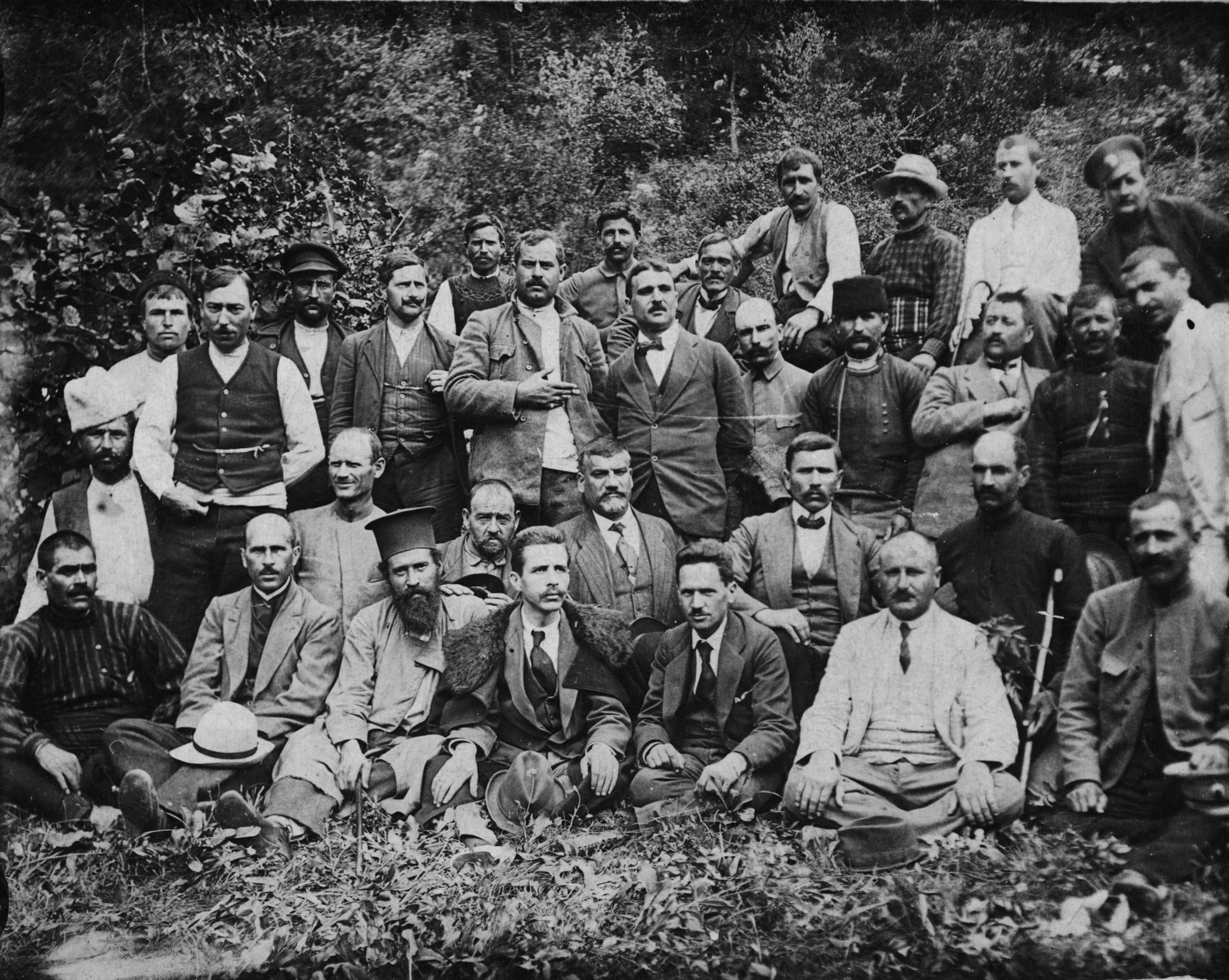 Създаването на Добруджански революционен комитет (ДРК) в Свещари, 1919 г